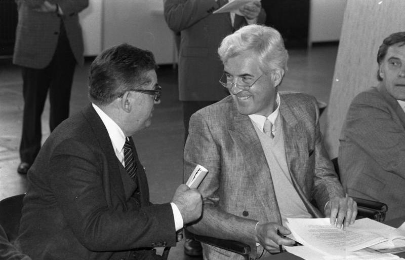 25.5.1983 31. Bundesparteitag der CDU in der Congress-Halle 8 der Kölner Messe.